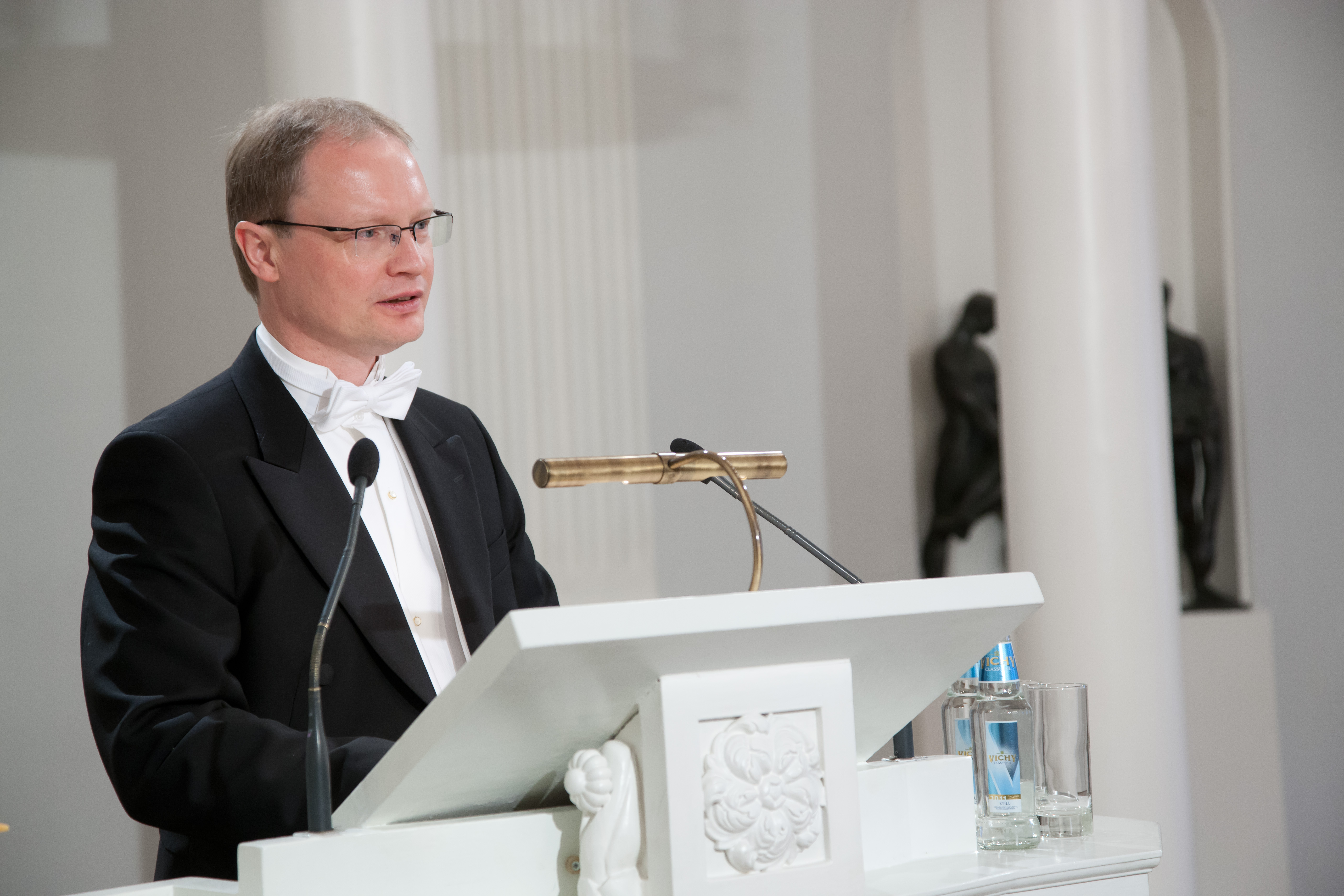 Rahvusülikooli 92. aastapäeva aktus aulas – akadeemiline loeng, ülikooli audoktorite ning doktorite promoveerimine, auliikmete nimetamine, TÜ Rahvusmõtte auhinna üleandmine 1. detsembril 2011. Pildil Sotsiaal- ja haridusteaduskonna dekaan prof Jaanus Harro audoktorite promoveerimisel.